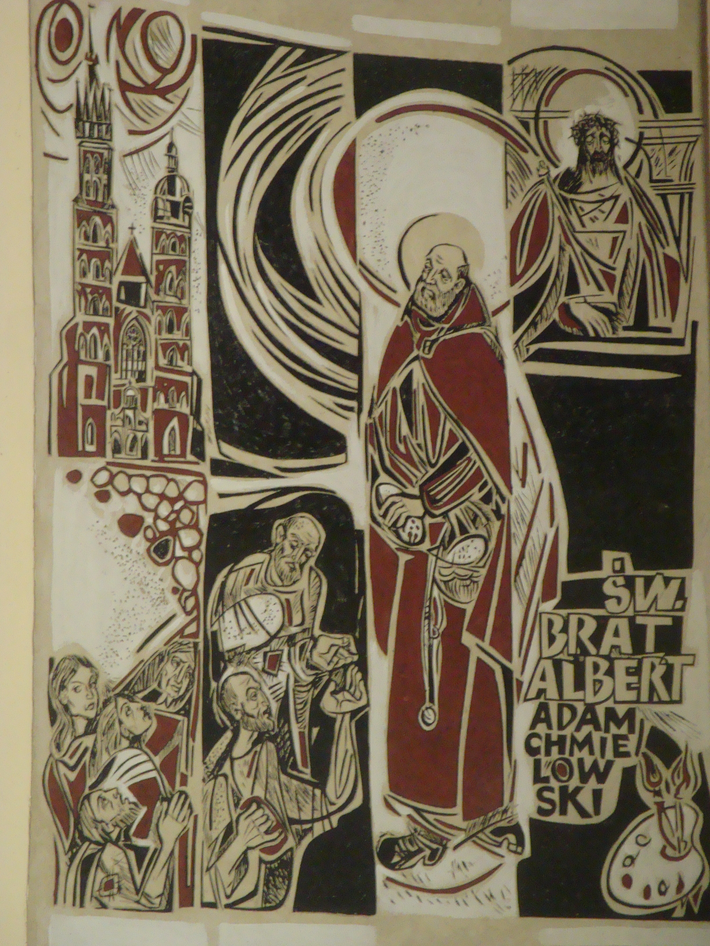 Kościół Matki Bożej Nieustającej Pomocy w Tarnobrzegu-Serbinowie